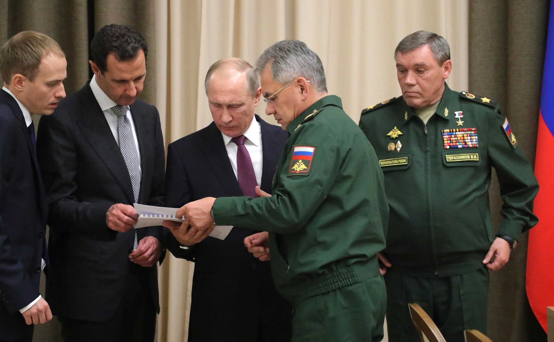 Президент России Владимир Путин с Президентом Сирийской Арабской Республики Башаром Асадом на встрече с руководящим составом Министерства обороны и Генерального штаба Вооружённых Сил Российской Федерации